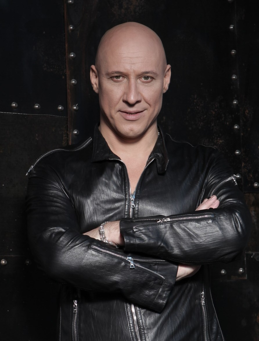 Российский автор-исполнитель песен, композитор, поэт Денис Майданов